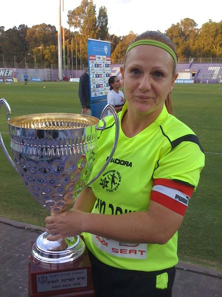 איריס אברהם מחזיקה גביע